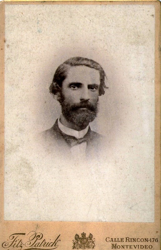 Eduardo Acevedo Maturana (foto en dominio público).